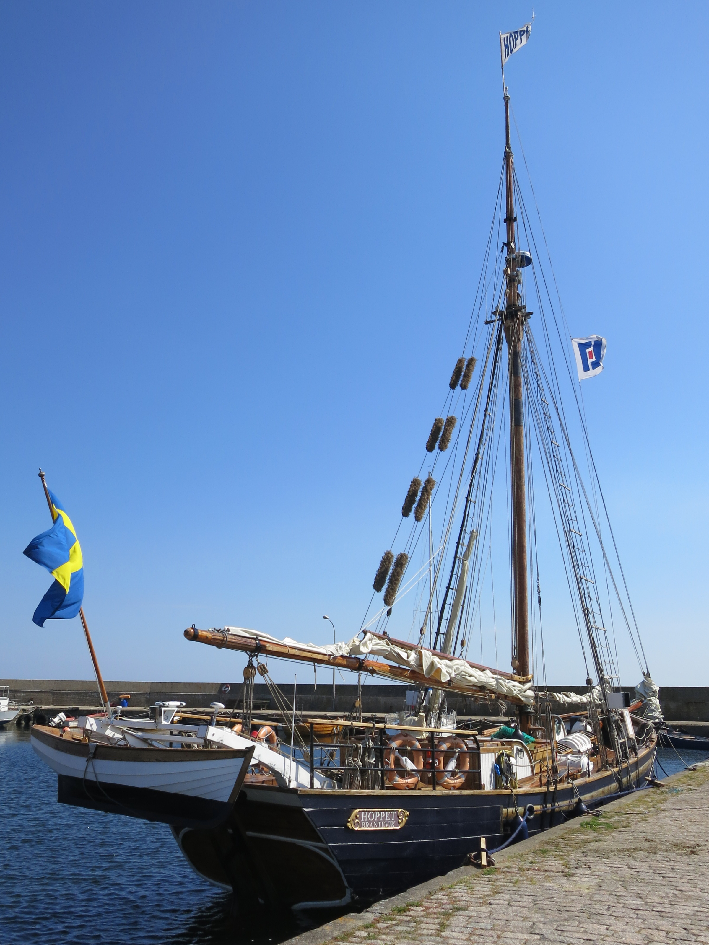 Föreningen Jakten Varvet, Södra Hamnen. Simrishamn, Brantevik